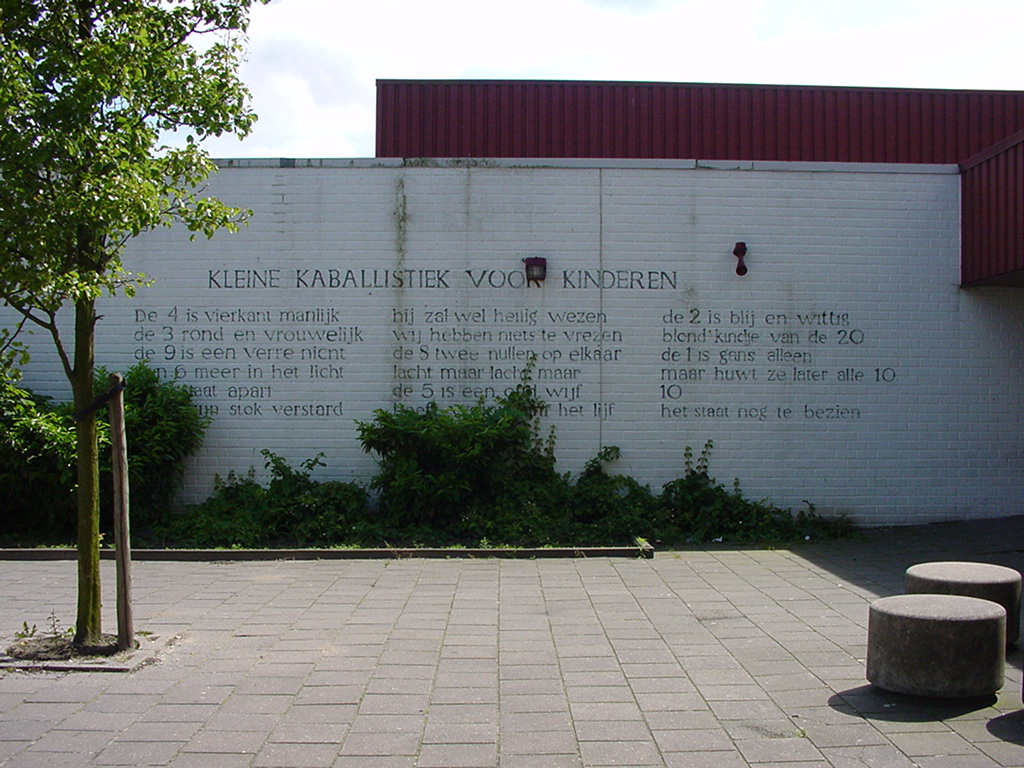 Gerrit Achterberg: Kleine kaballistiek voor kinderen. Dit muurgedicht stond sinds ca. 1987 aan de Noachstraat 2 (speelplaats Rembrandt Scholengemeenschap aan de Brandts Buyskade), Leiden. Het is met de sloop van dit deel van het schoolgebouw verdwenen.